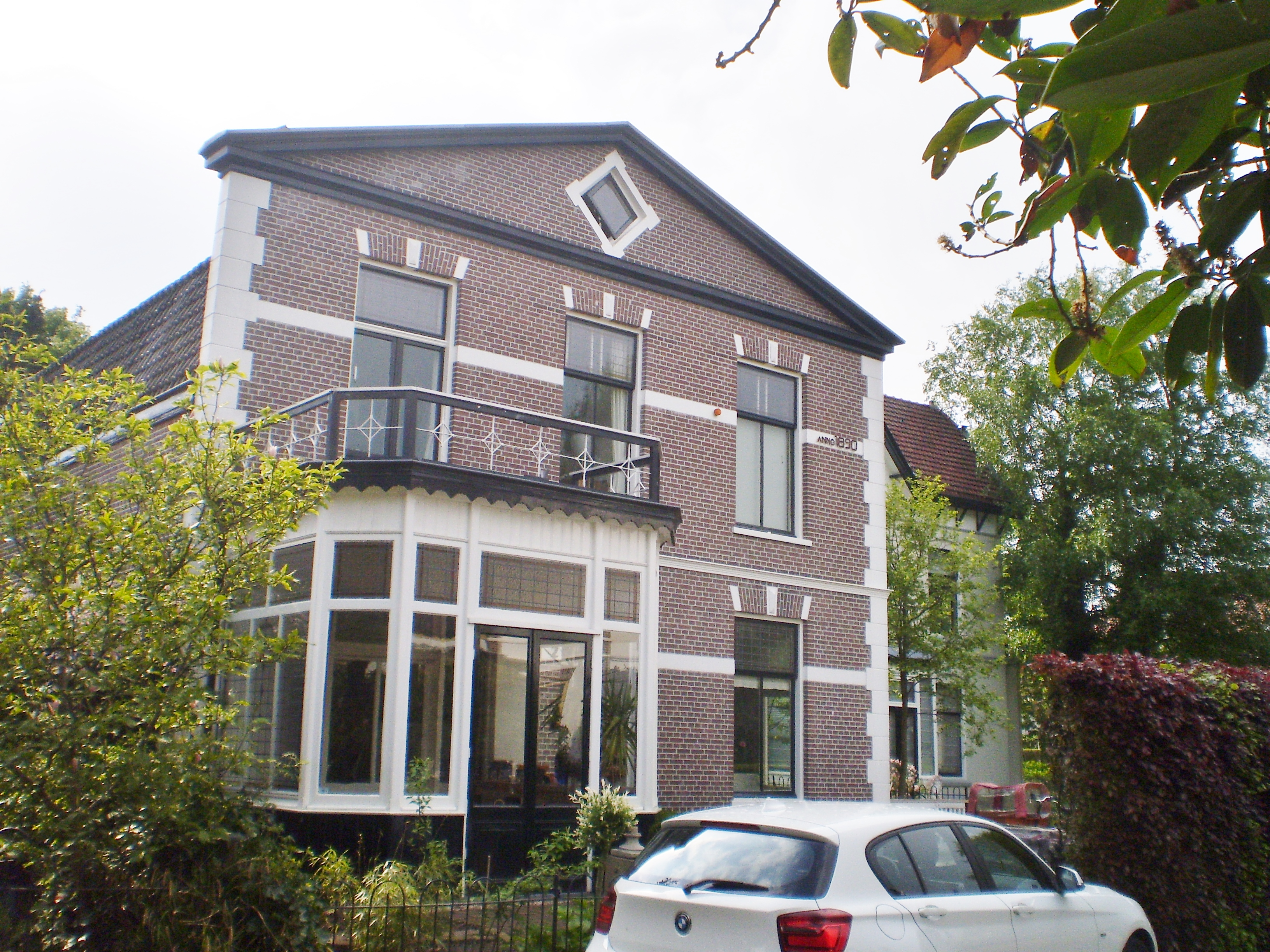 Aan de Javastraat